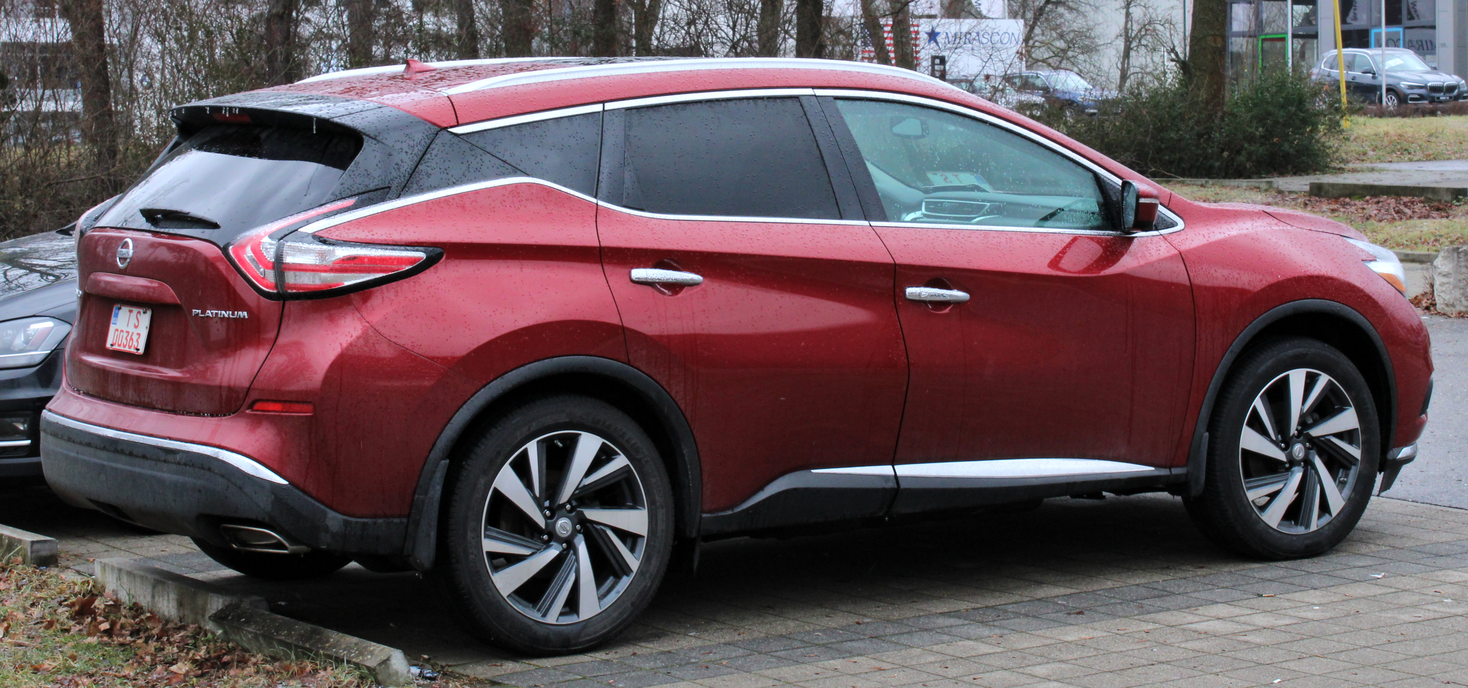 Nissan Murano Platinum in Stuttgart-Vaihingen